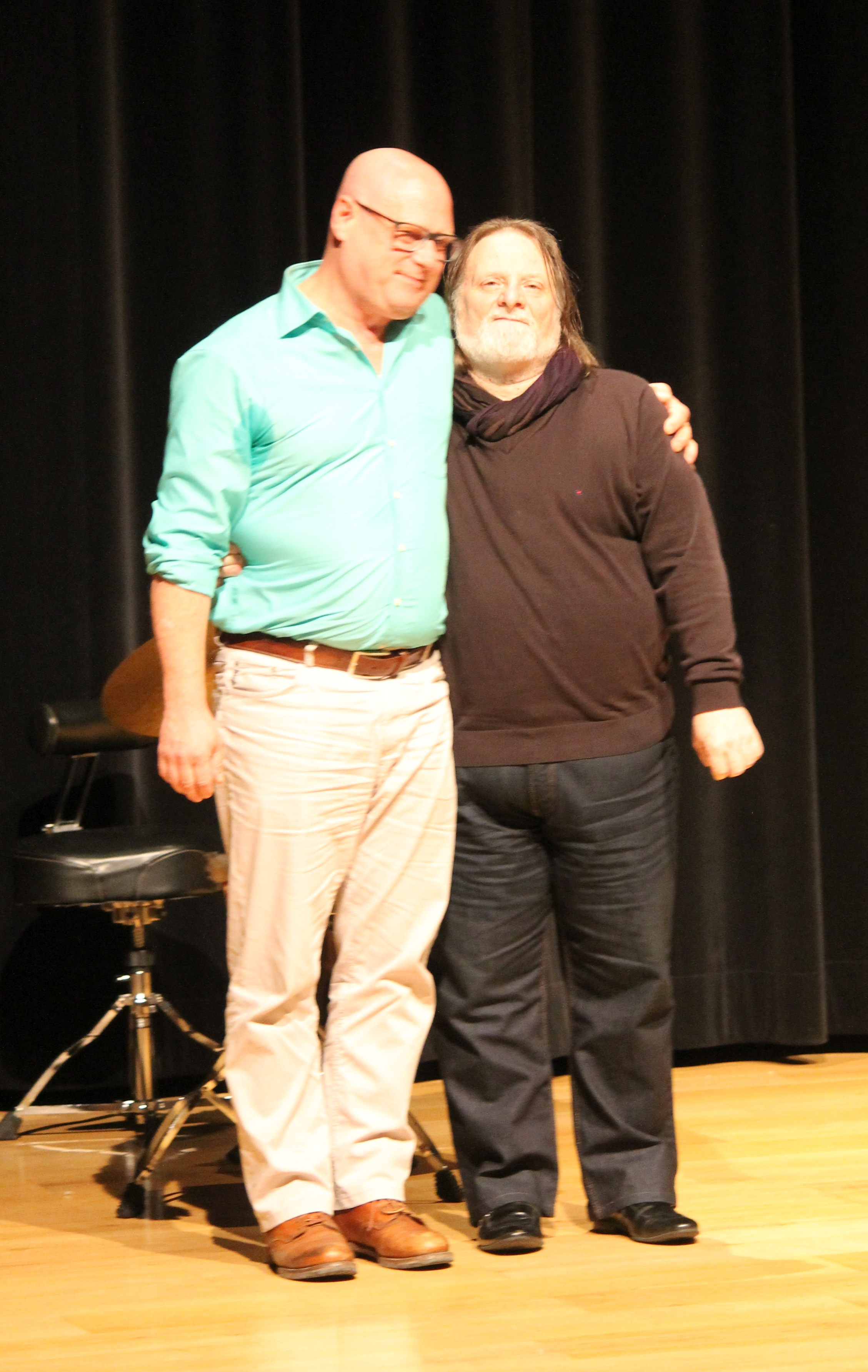 Christian Scheuber (l.) Richie Beirach (r.) 15. Nov. 2015, Erstein